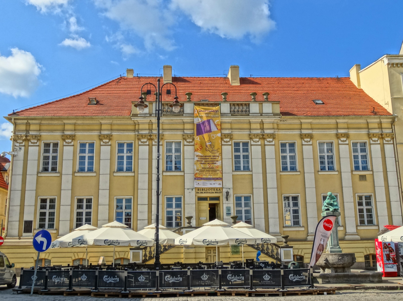 Wojewódzka i Miejska Biblioteka Publiczna w Bydgoszczy, budynek przy Starym Rynku